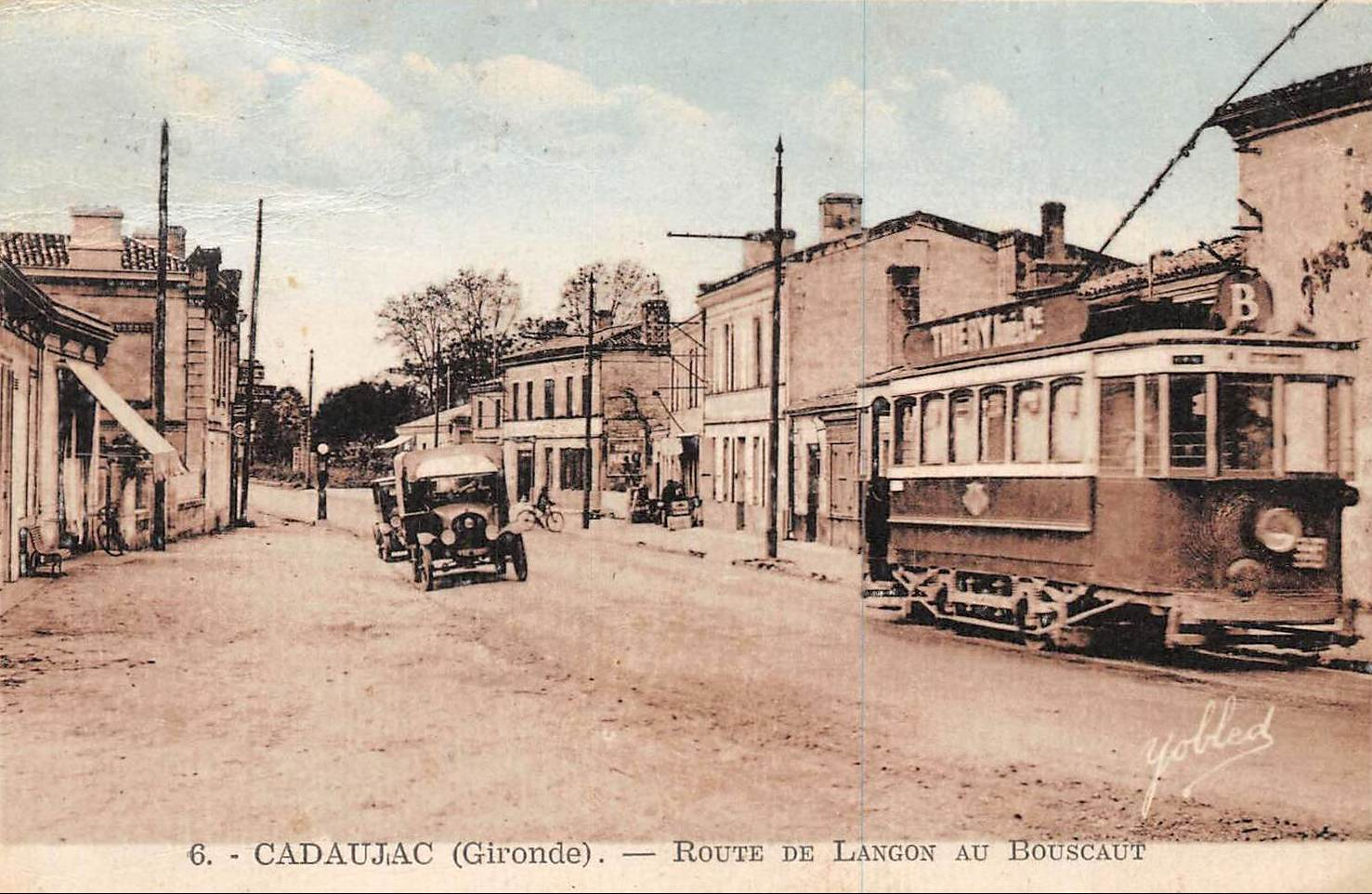 Cadaujac sur carte-postale